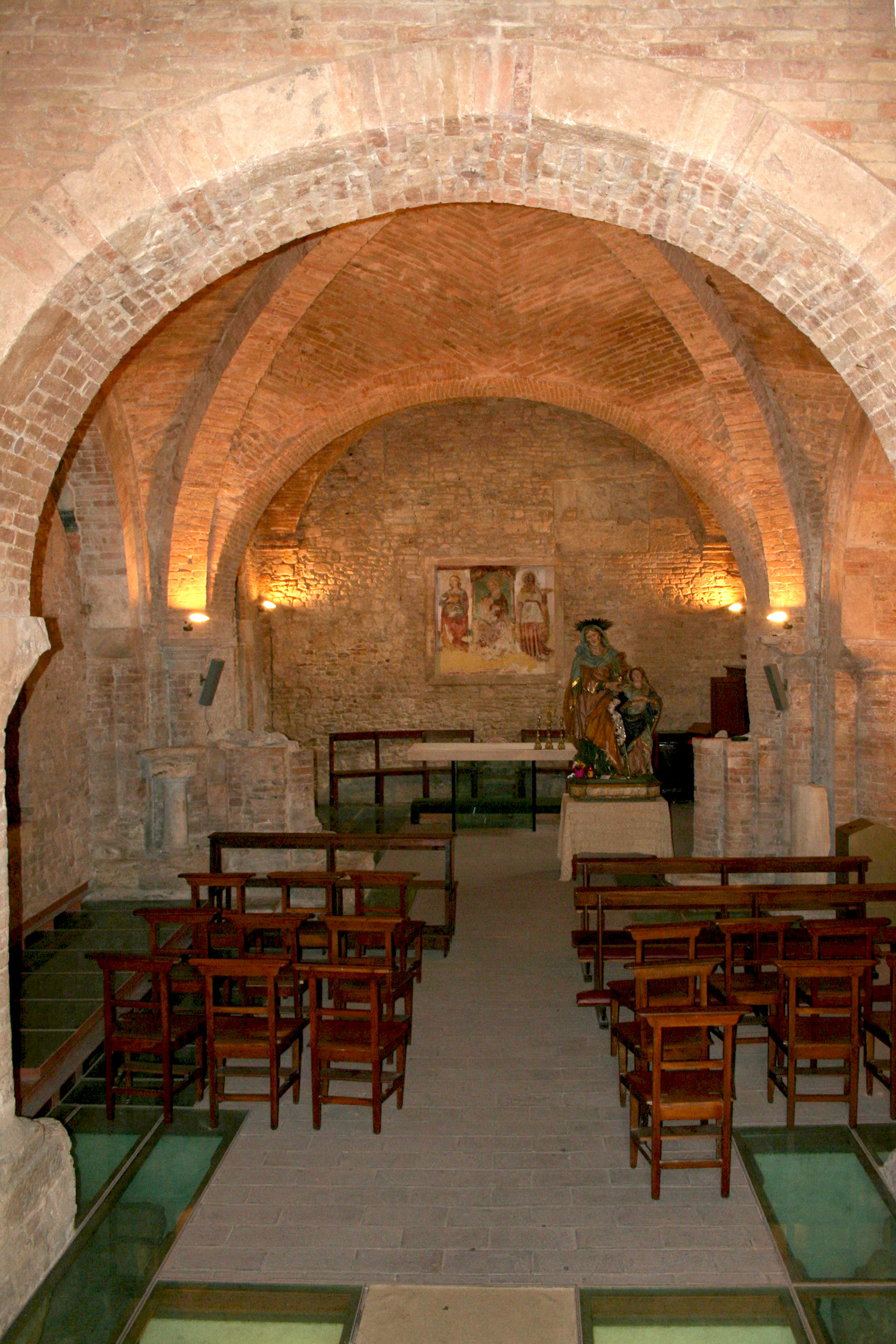 Chiesa di Sant'Anna dei Pompetti di Teramo, interno. Un sentito ringraziamento a Don Paolo Di Mattia, parroco della chiesa di Sant’Antonio in Teramo, che ha consentito lo scatto di questa immagine.